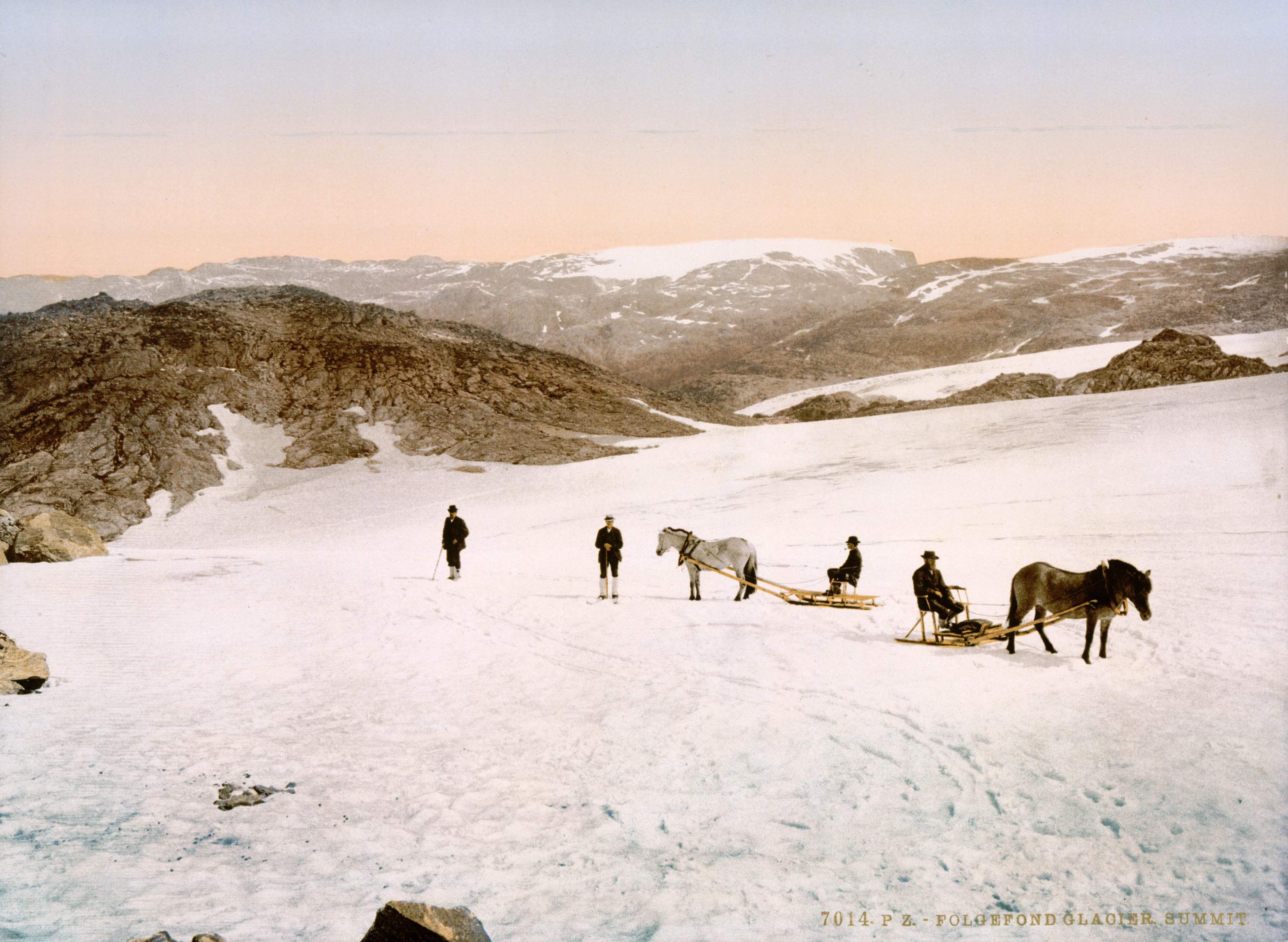 Folgefonn Glacier, Hardanger Fjord, Norway